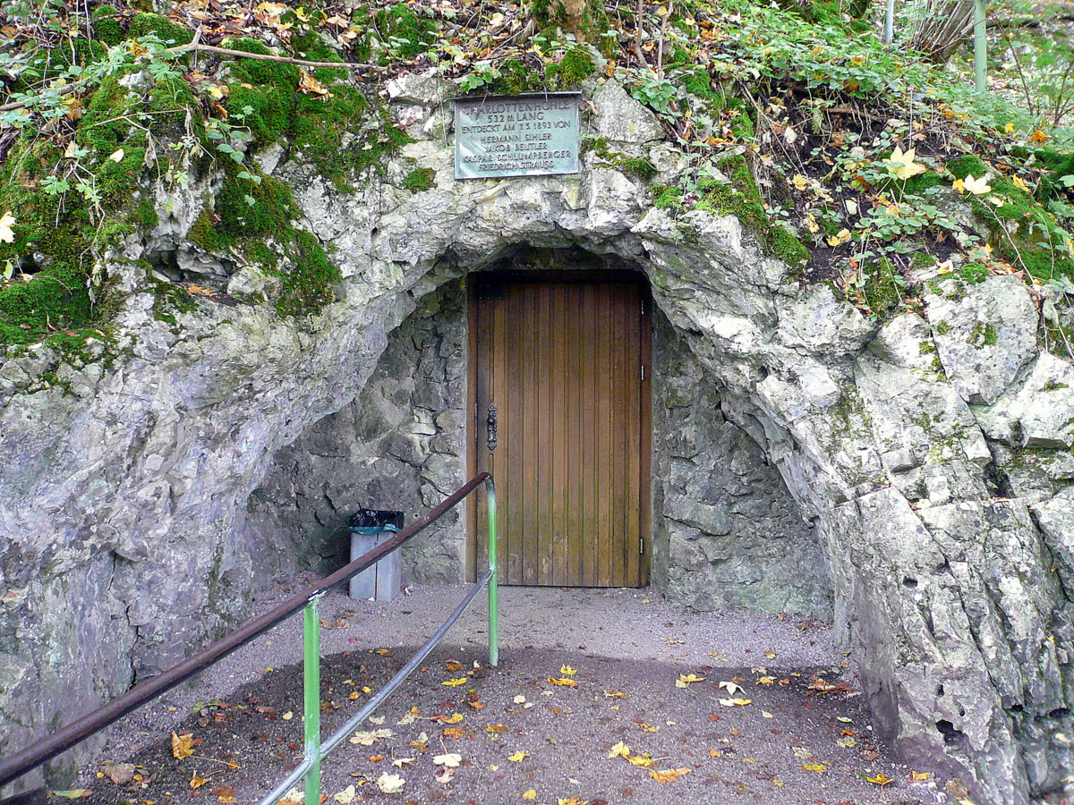 Charlottenhöhle